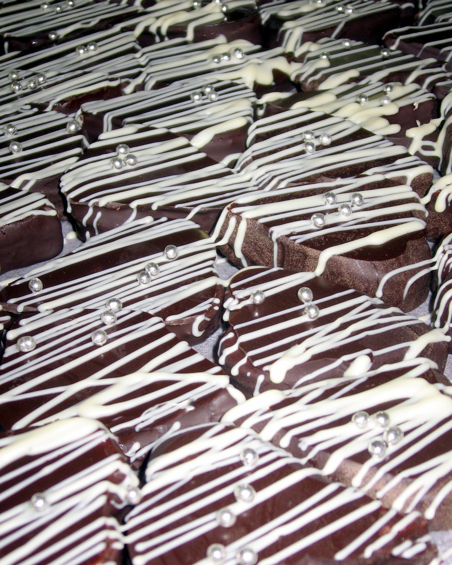 Bicos de Ferrol, sobremesa típica desta cidade da Galiza.